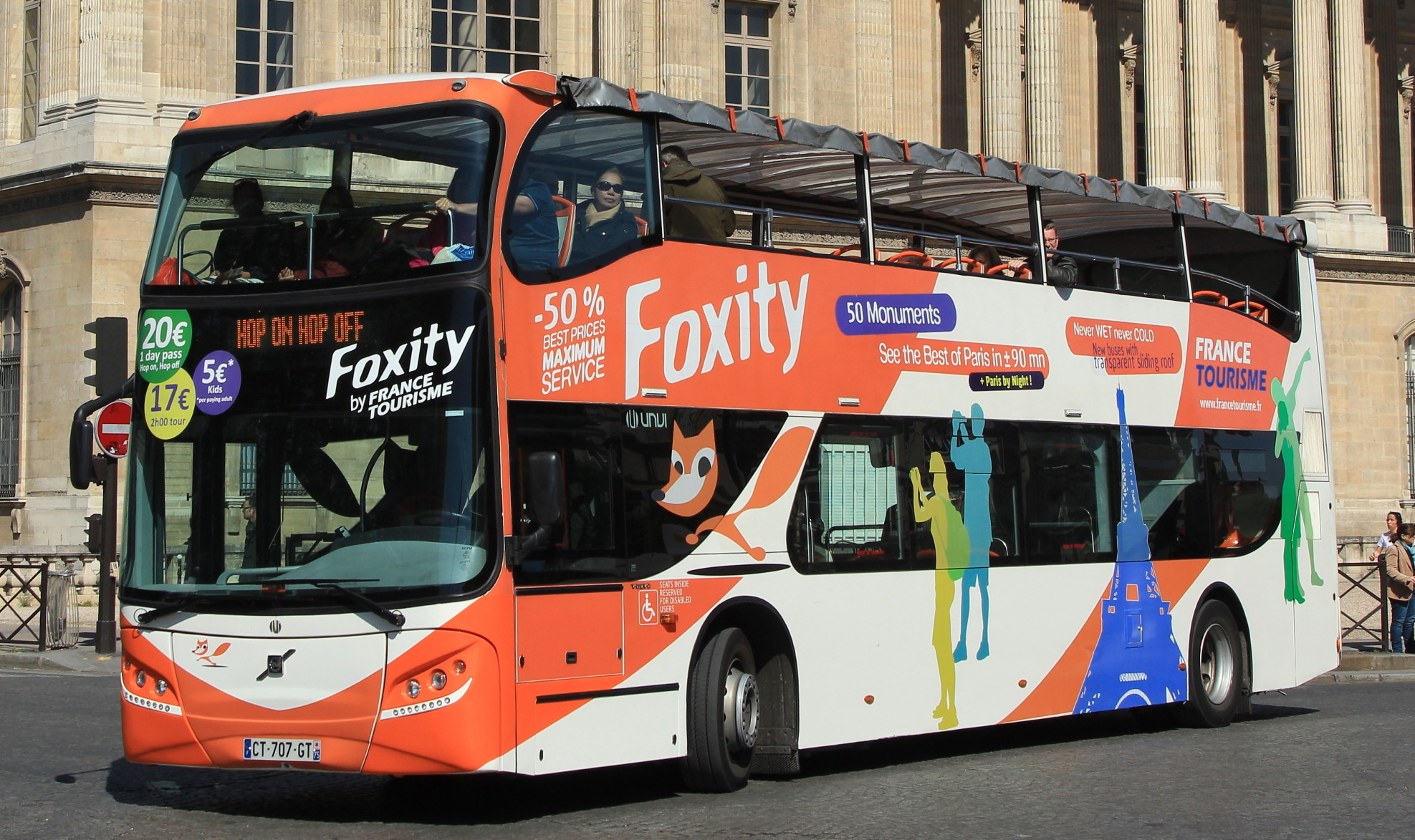 Un bus Volvo de Foxity rue de l'Amiral de Coligny à Paris.